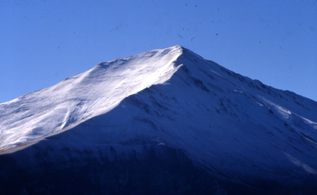 Monte Priora dal Monte Amandola (by Giulio Beattini).